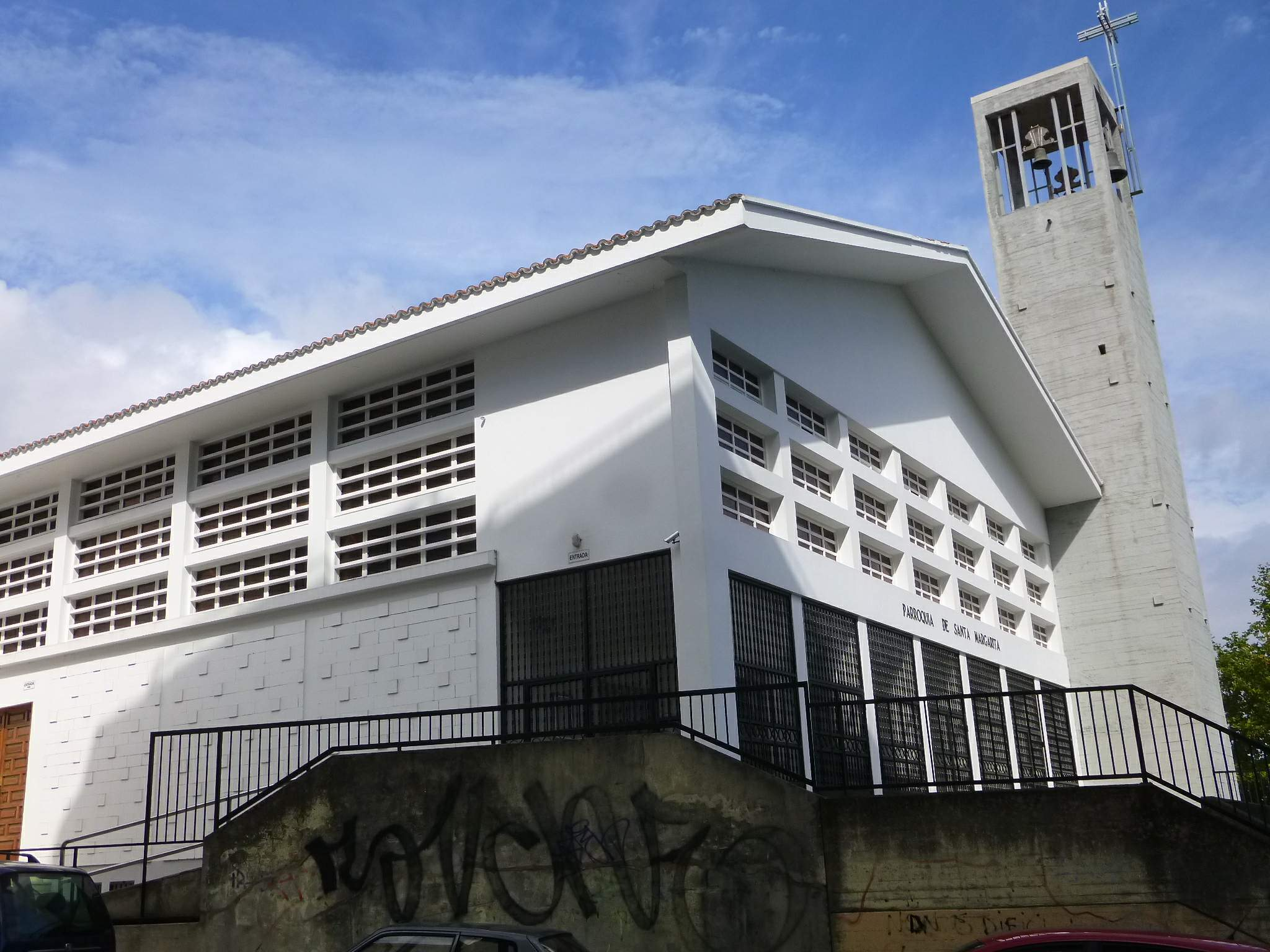 A Coruña - Iglesia de Santa MargaritaGalego: Igrexa de Santa Margarida, A Coruña, Galiza